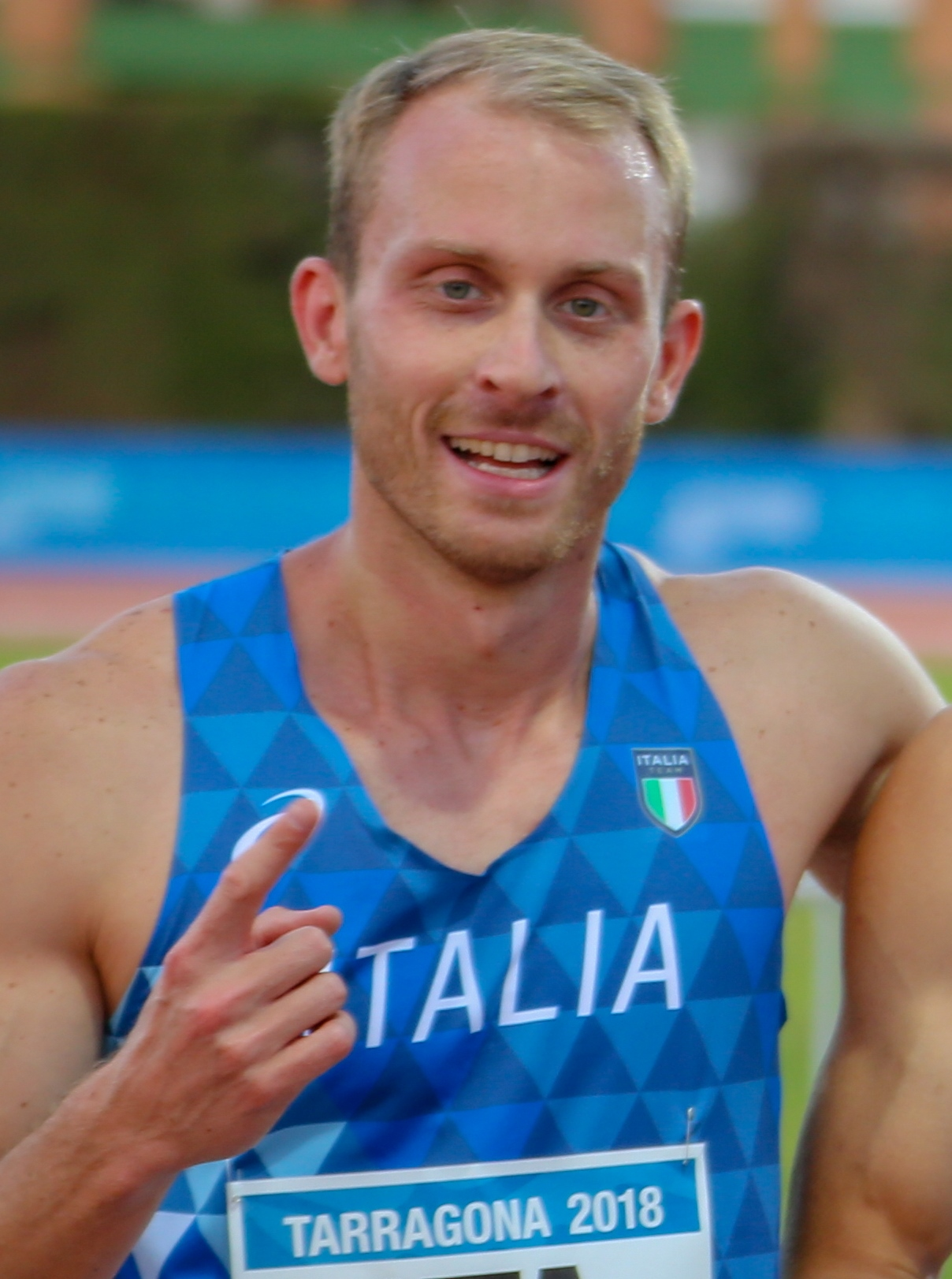 Michele Tricca en los relevos 4x400 en los Juegos del Mediterráneo 2018